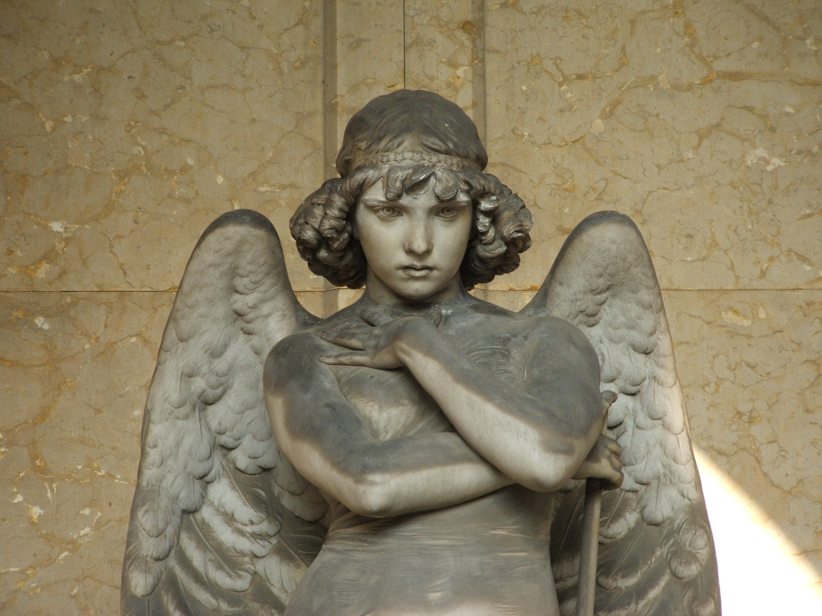 Cimitero monumentale di Staglieno, Genova, tomba Oneto - statua dell'Angelo, di Giulio Monteverde.